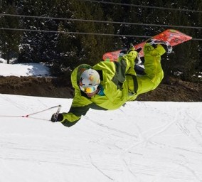 Espectacular salto de Snow Towing